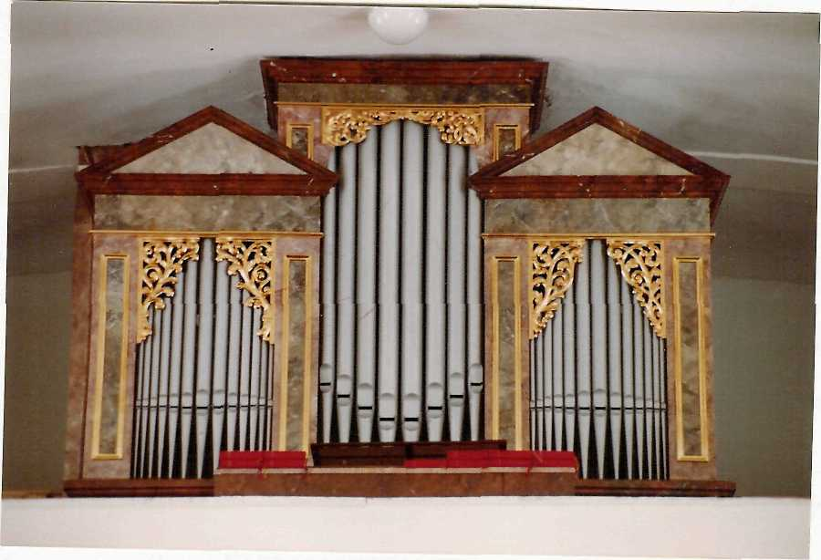 Johann Nepomuk Carl Mauracher-Orgel aus dem Jahre 1868